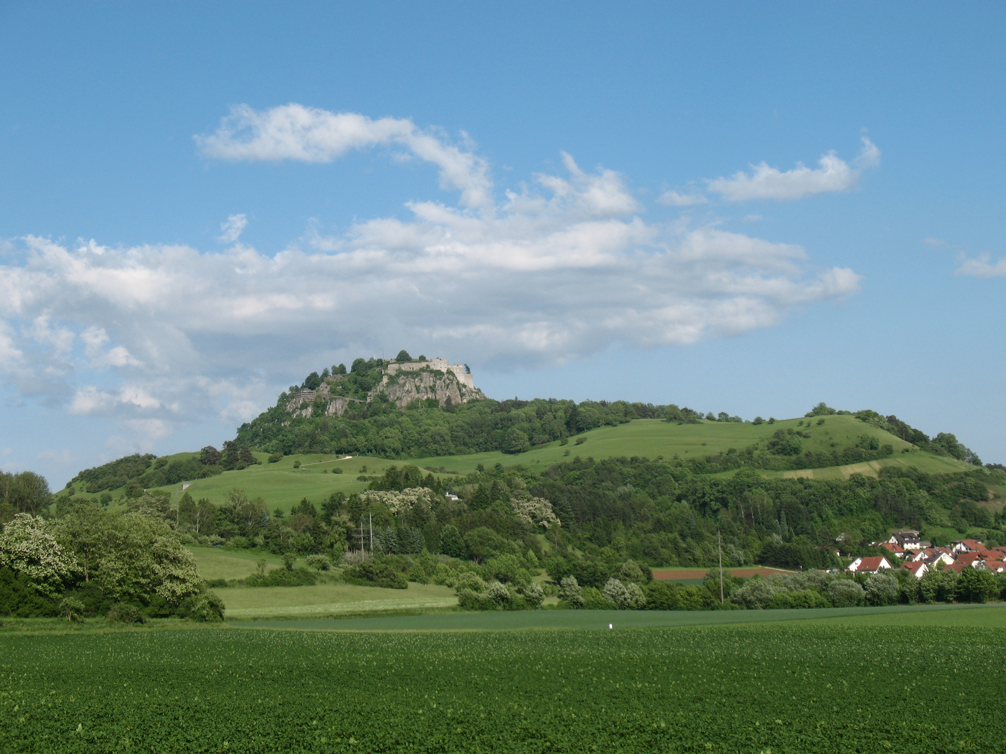 Nordansicht des Hohentwiel (686 m) mit Festungs-Ruine und Twielfeld (rechts)